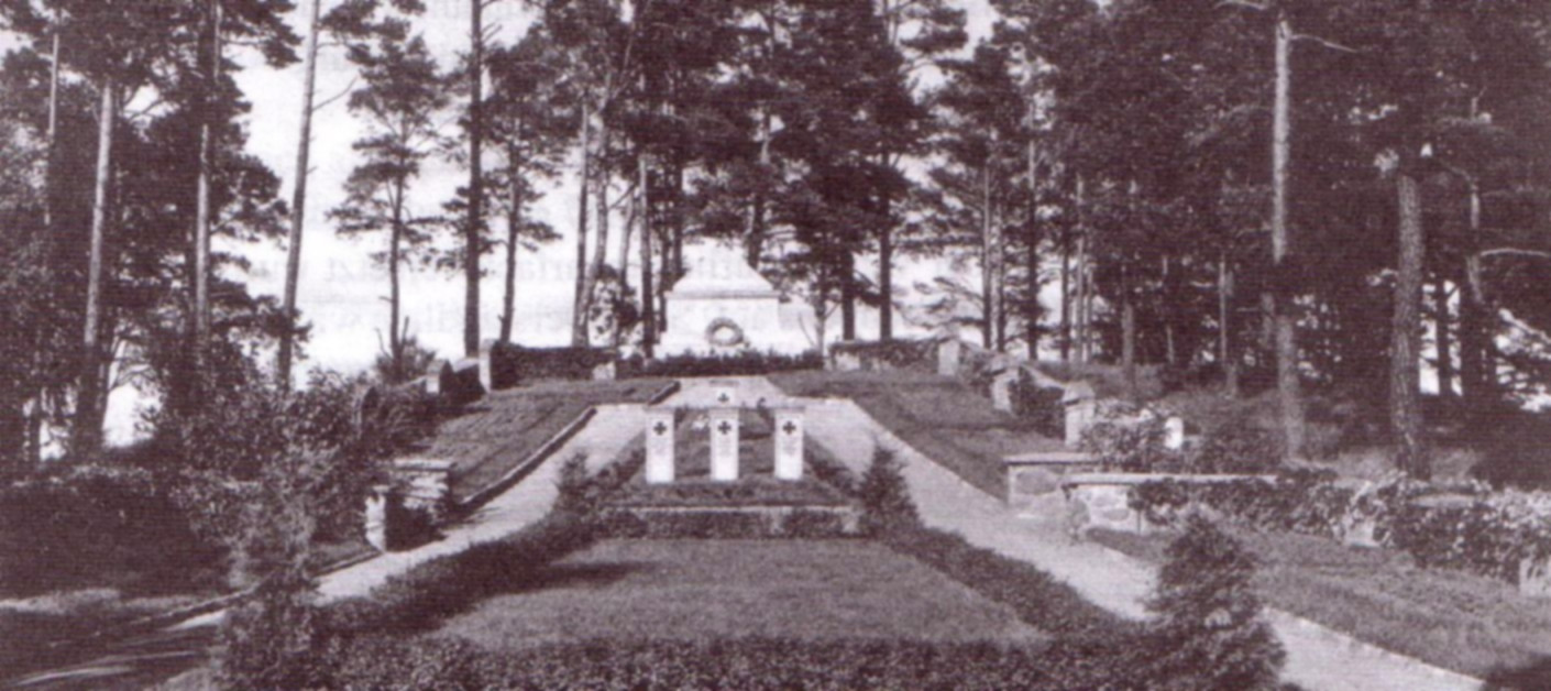 Denkmal des Kreises Lyck für die Gefallenen des Ersten Weltkriegs auf dem Wachtberg bei Talusy (Thalussen), kreis Lyck